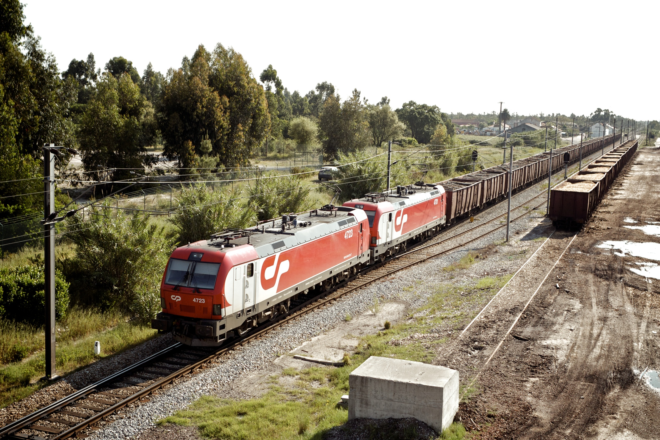 Tipo: Comboio de Transporte de Madeira 61380 [Entroncamento - Praias do Sado] Local: Estação de Pegões [Linha do Alentejo, PK 41] Data e hora: 26 de Abril de 2011 [09h39] Material: Locomotivas 4723 e 4701 + xx vagões CP Ealos